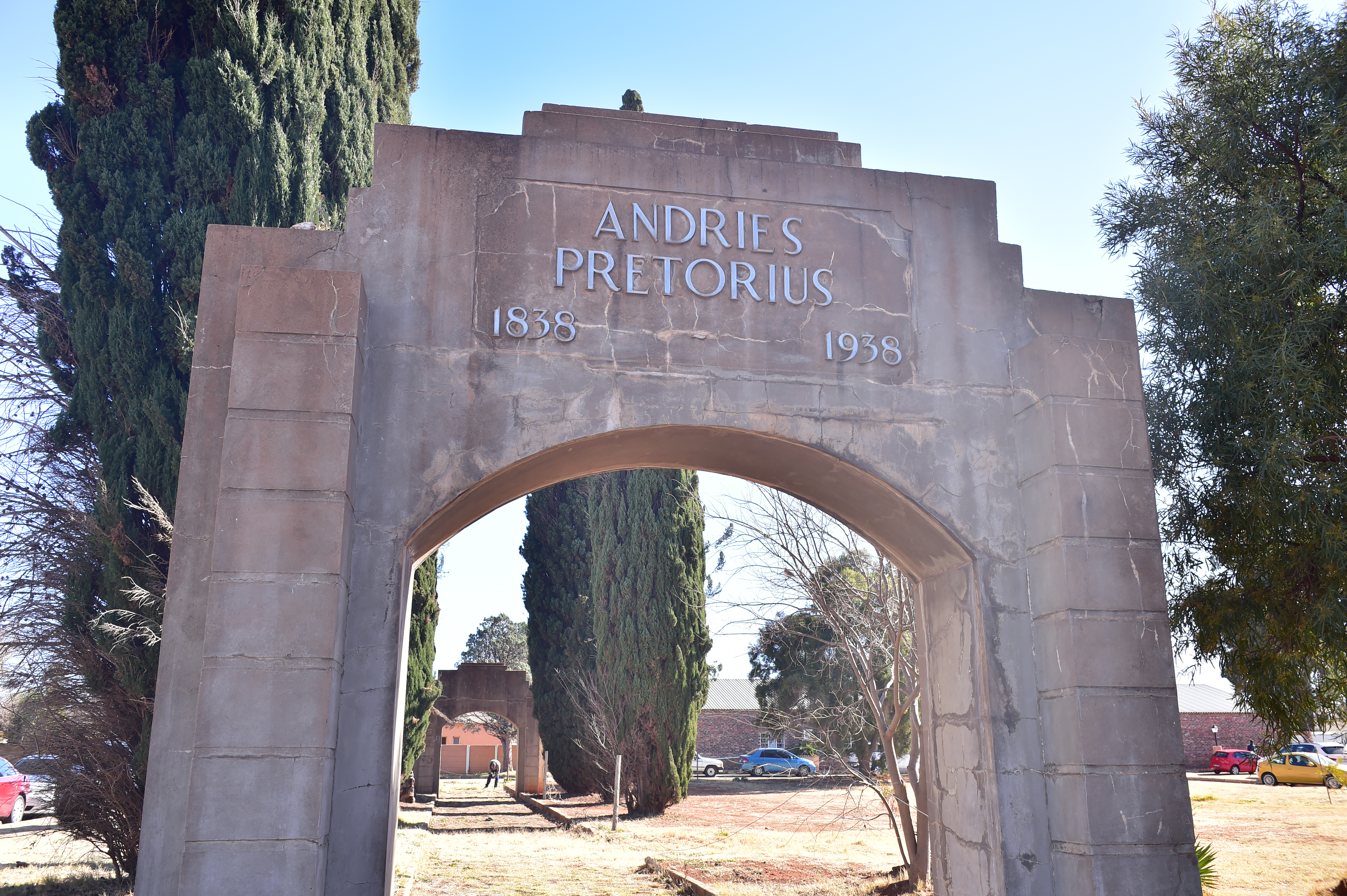 Vue du North West en Afrique du Sud.